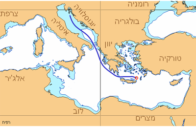 אוניית המעפילים רפיח - מסלול